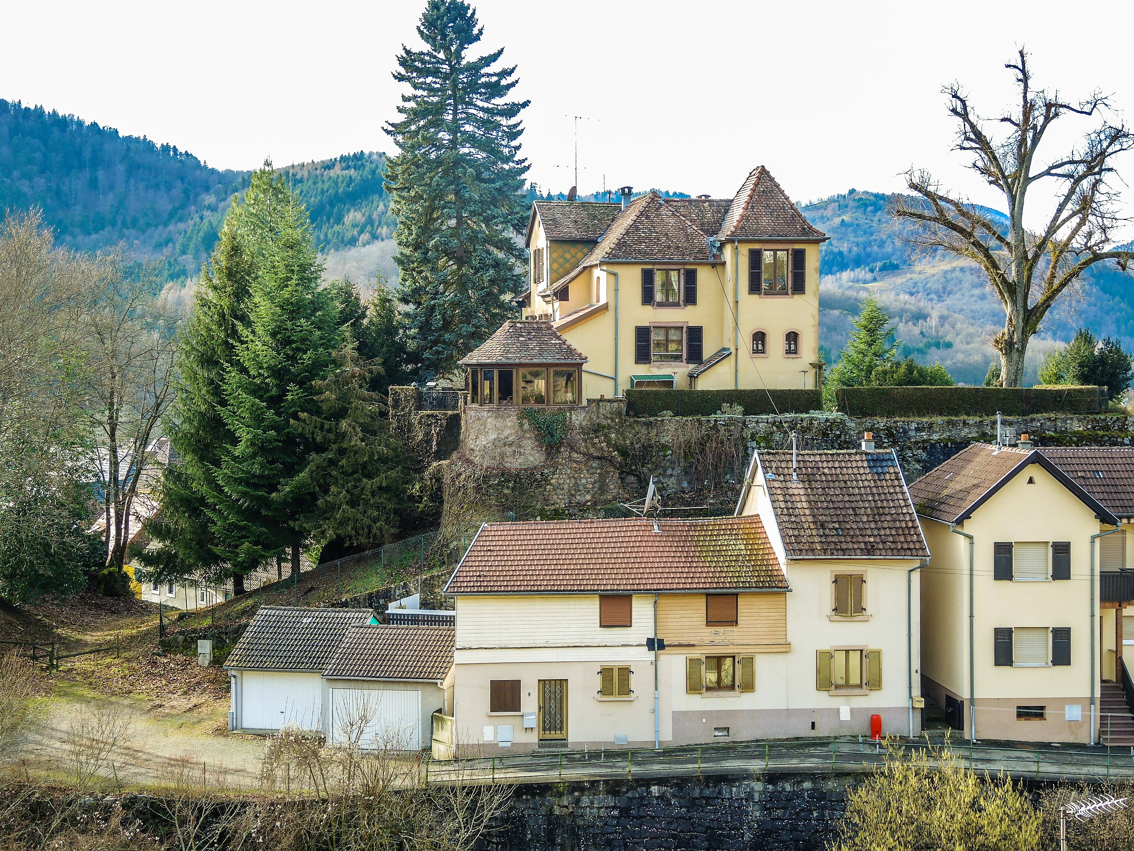 Aspect actuel de l'ancien château du Friedberg. Saint-Amarin.Haut-Rhin.